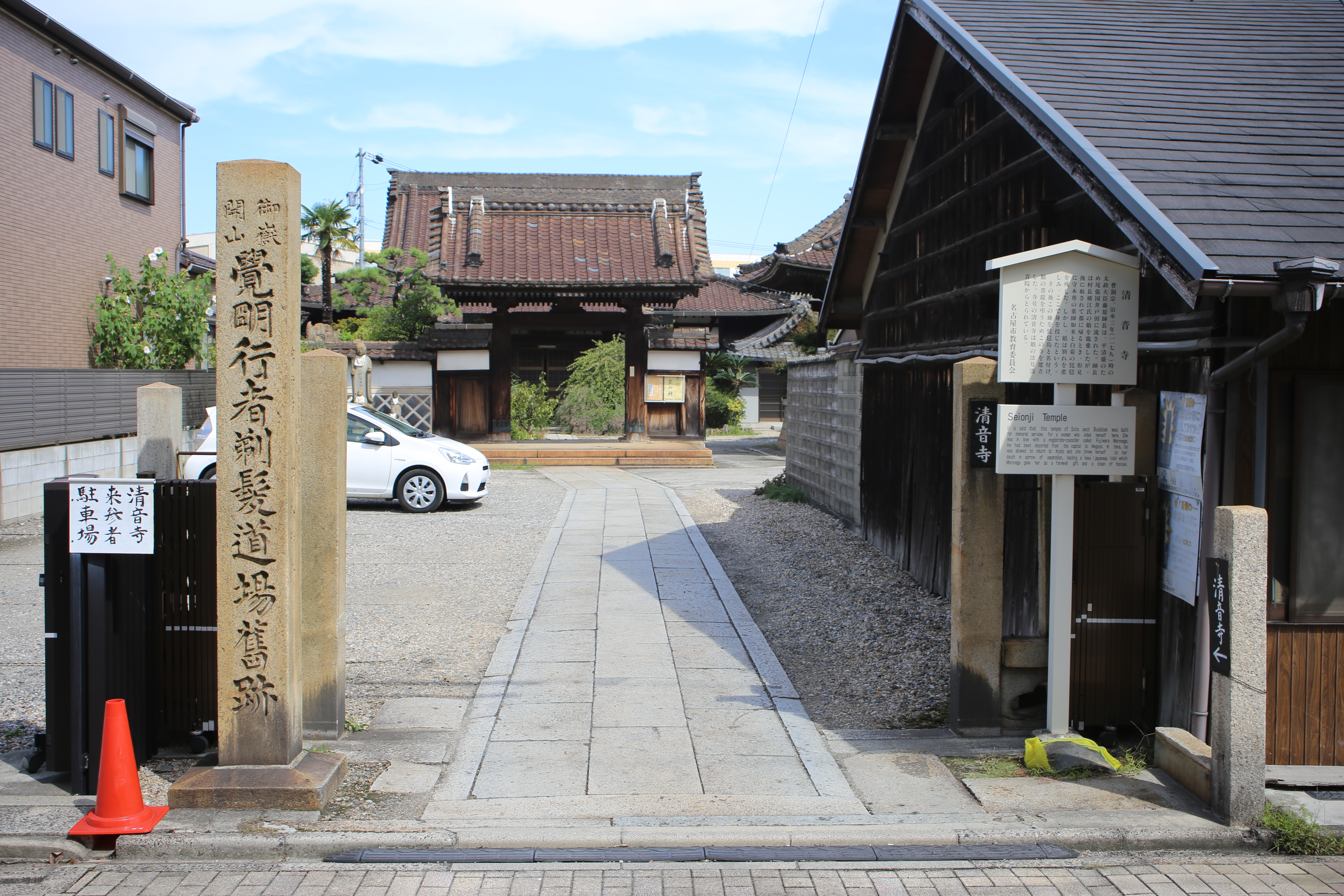 名古屋市西区枇杷島三丁目の清音寺